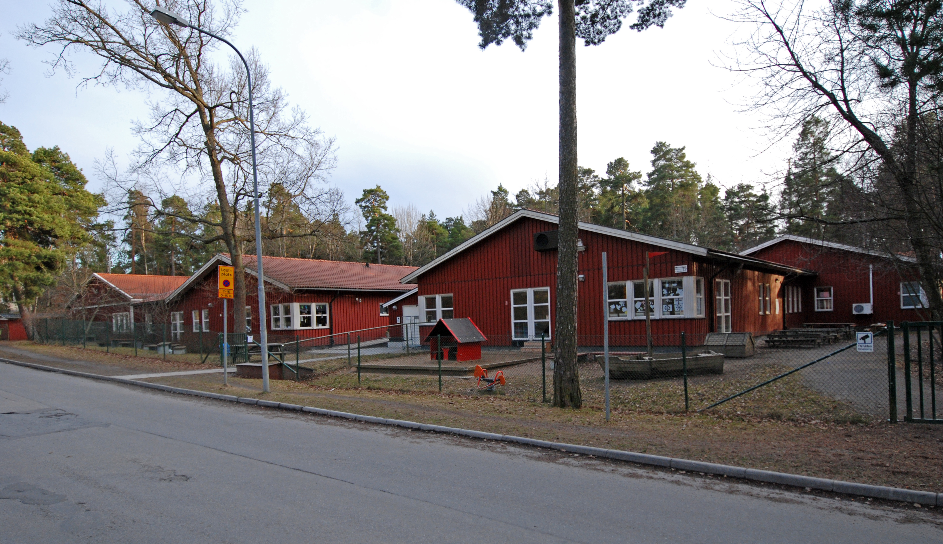 Bromma Enskilda Skola